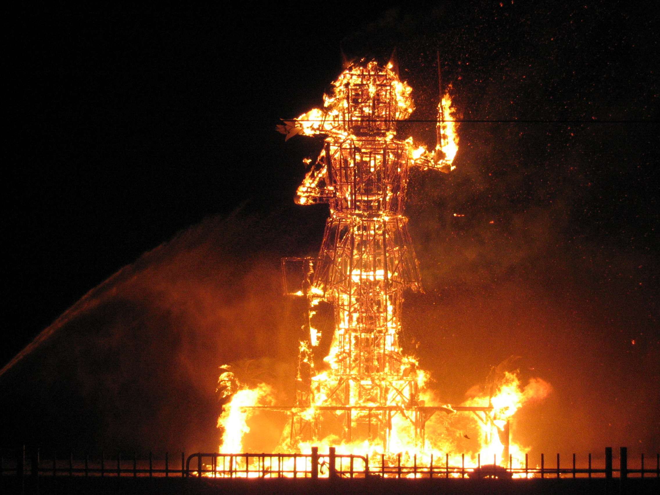 El dimoni acaba de cremar. Cremada del Dimoni 2006 (Badalona)